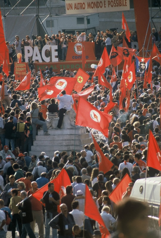 Manifestazione per la pace del PRC